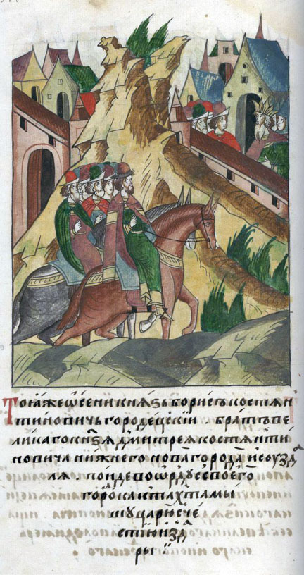 ЛИЦЕВОЙ ЛЕТОПИСНЫЙ СВОД: Той же осенью князь Борис Константинович Городецкий, брат великого князя Дмитрия Константиновича Нижнего Новгорода и Суздаля, пошел в Орду из своего Городка к Тахтамышу царю с честью и с дарами.